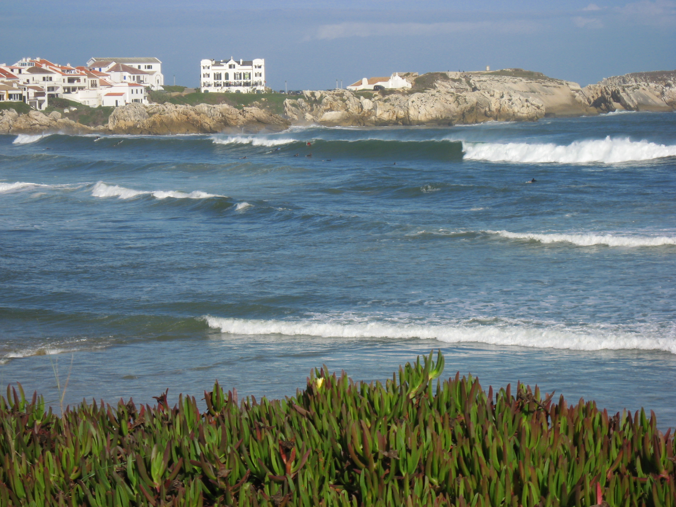 Die Halbinsel Baleal